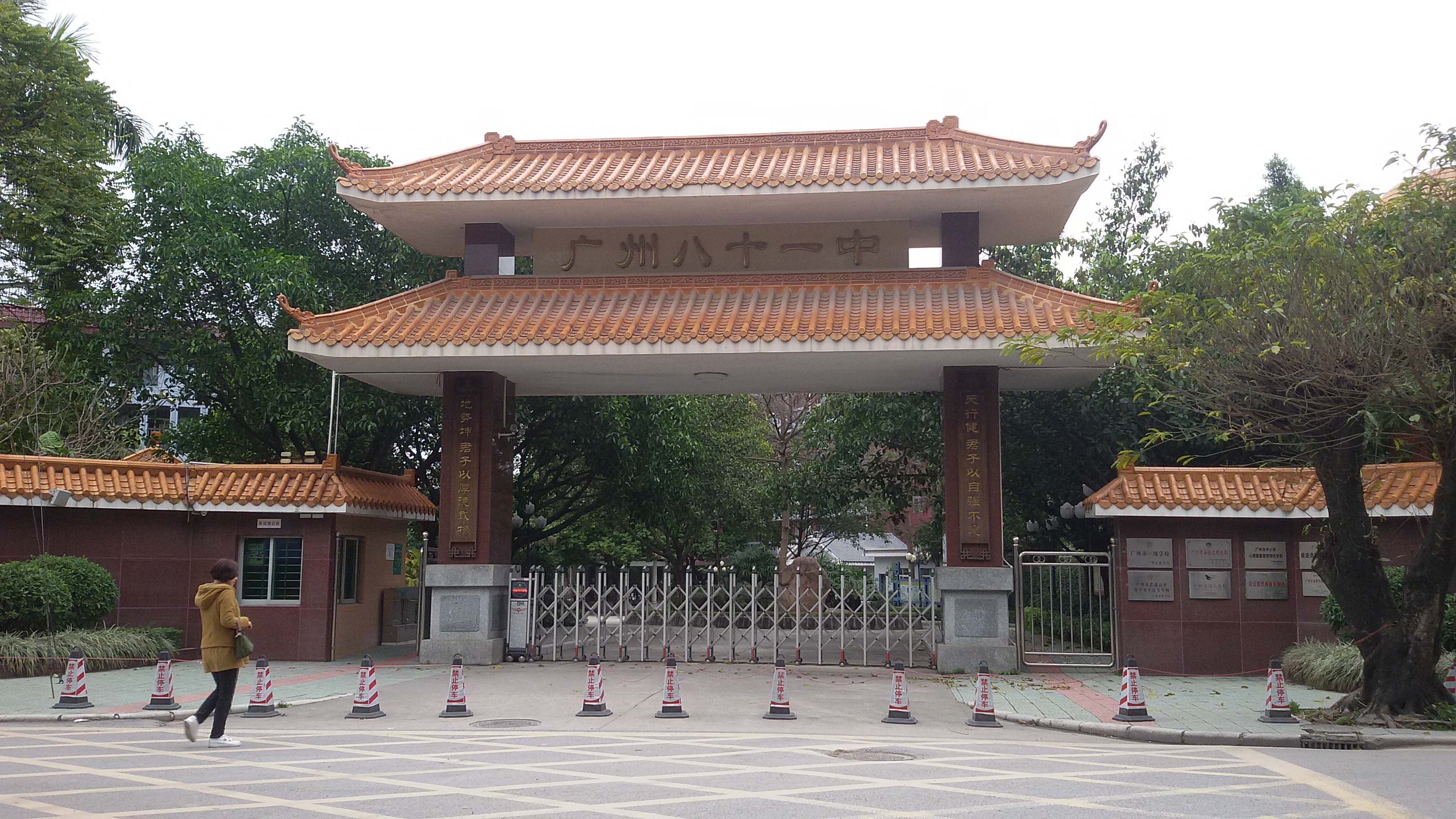 粵語: 广州市第81中学